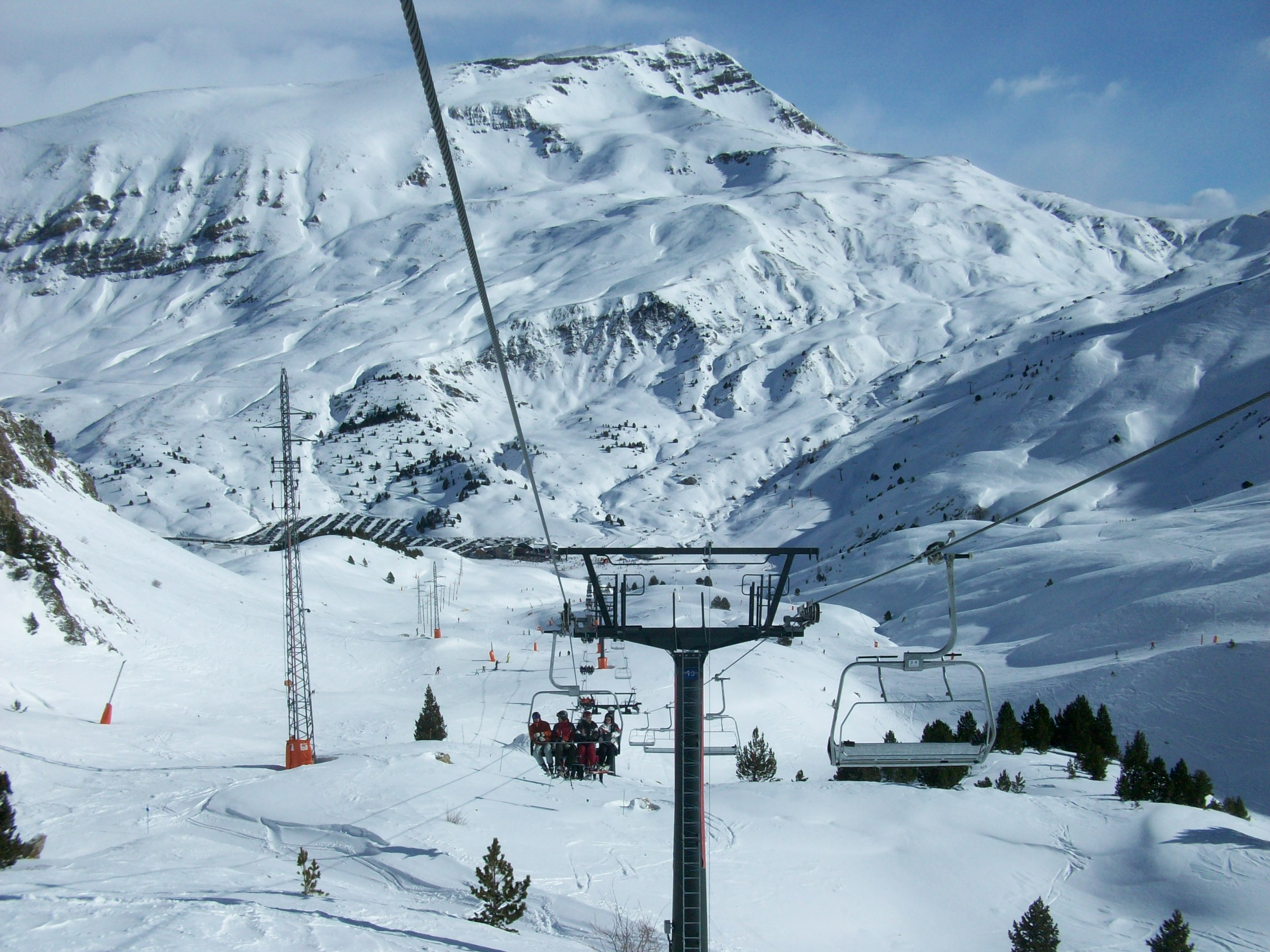 En cada estación suelen tener unos cuantos